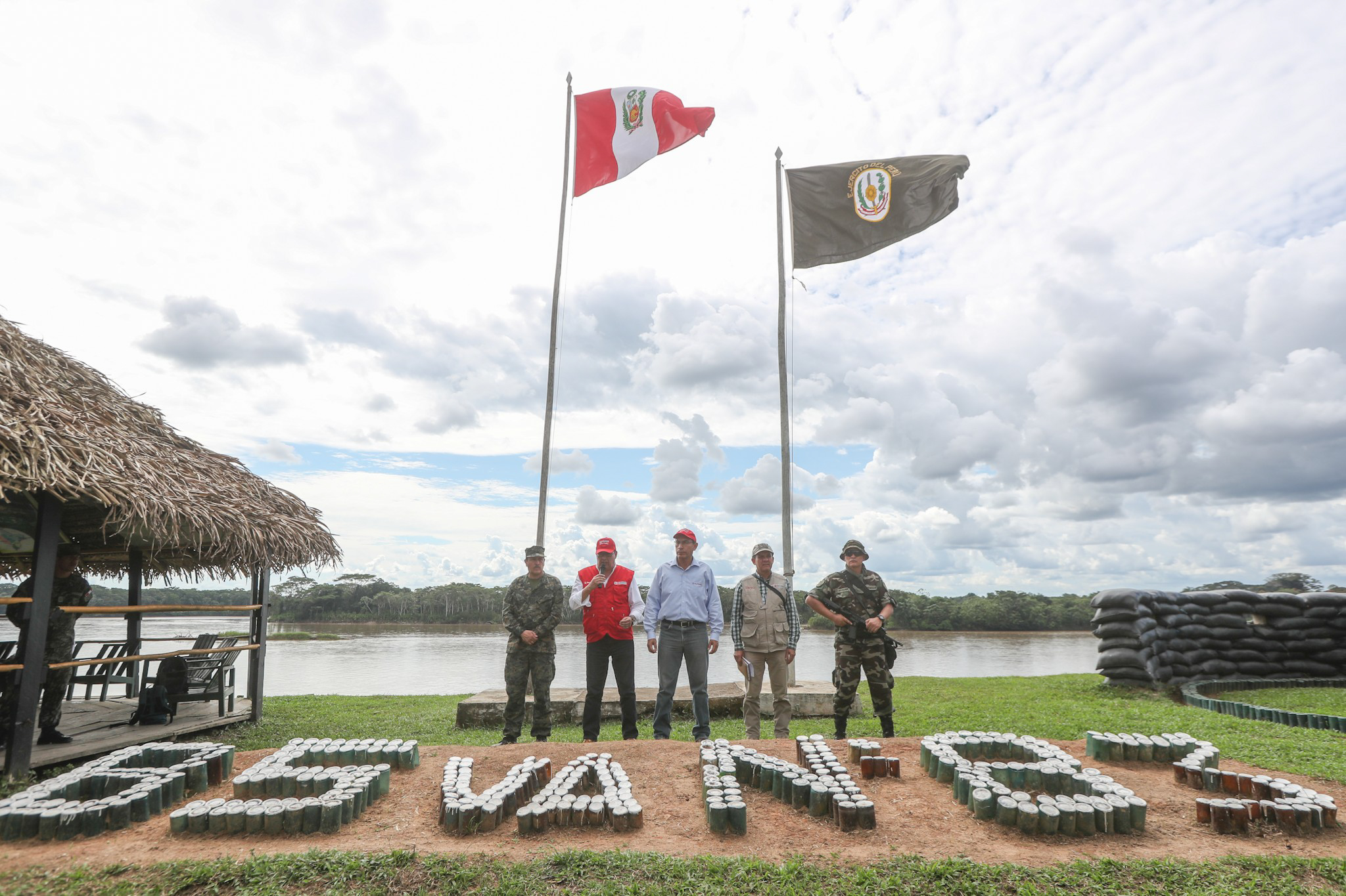 Güeppí durante un operativo militar policial con la presencia del presidente Martín Vizcarra